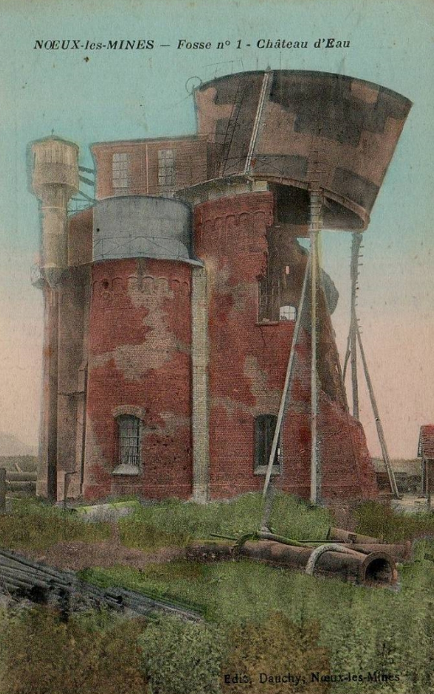 Photochrome du château d'eau bombardé de la Fosse n° 1 - 1 bis de la Compagnie des mines de Nœux, Nœux-les-Mines, Pas-de-Calais, Nord-Pas-de-Calais, France.